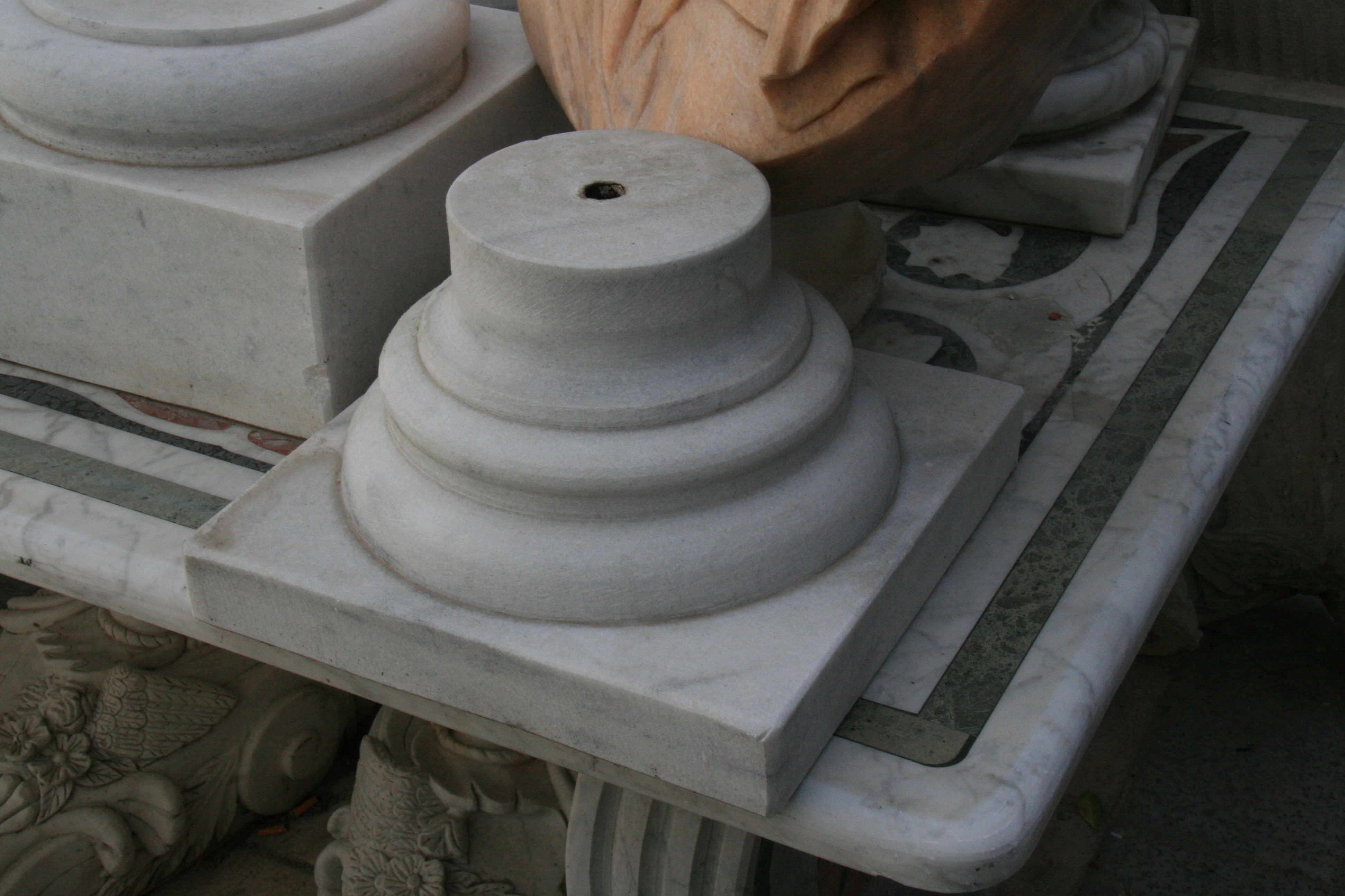 Basamento - Arquitectura